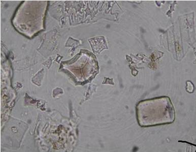 פיטוליטים מצורן של זרעי חרדל השום שנמצאו באתרים בצפון גרמניה ודנמרק מתוארך בין 6100 - 5700 לפנה"ס